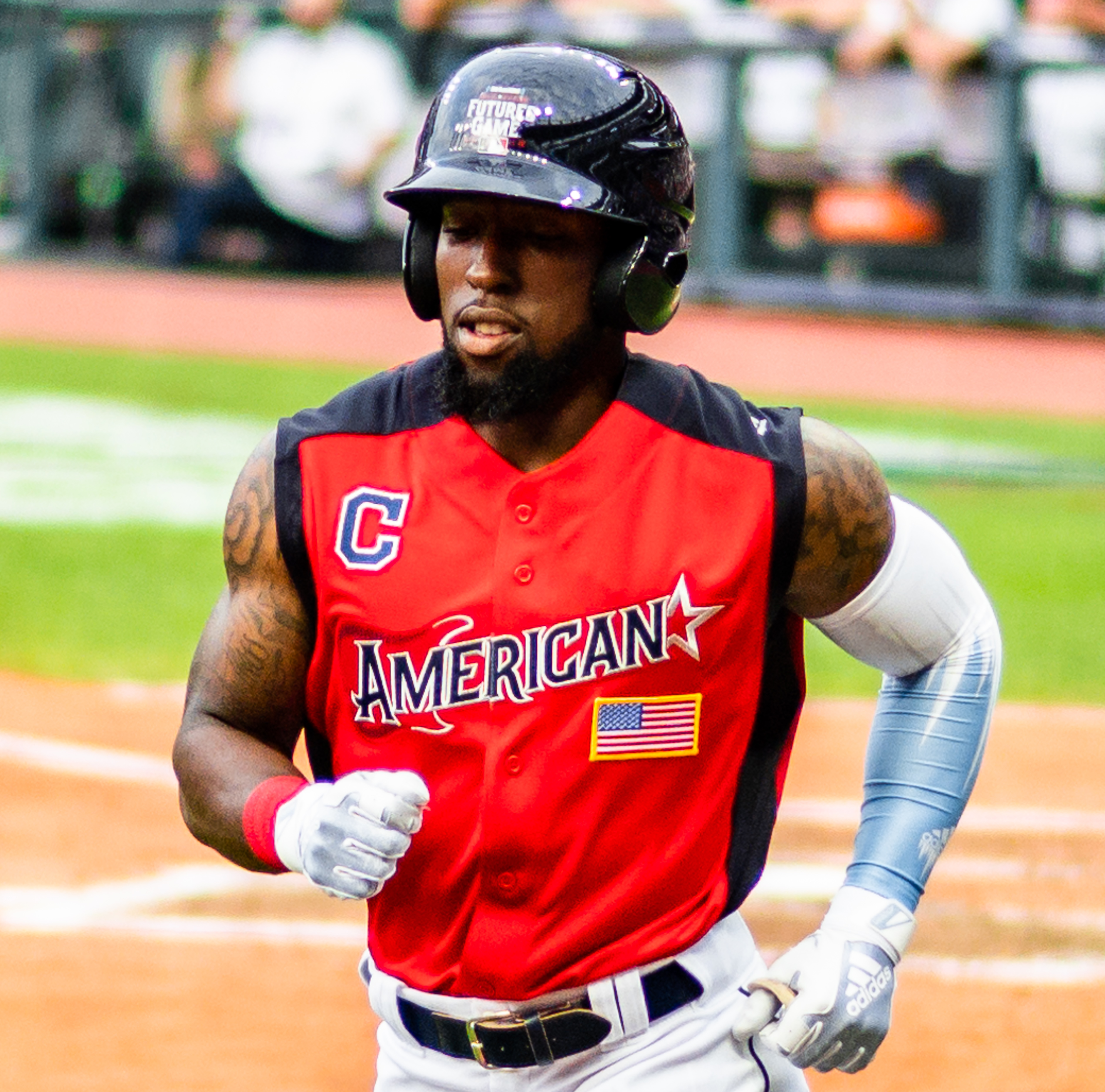 Daniel Johnson